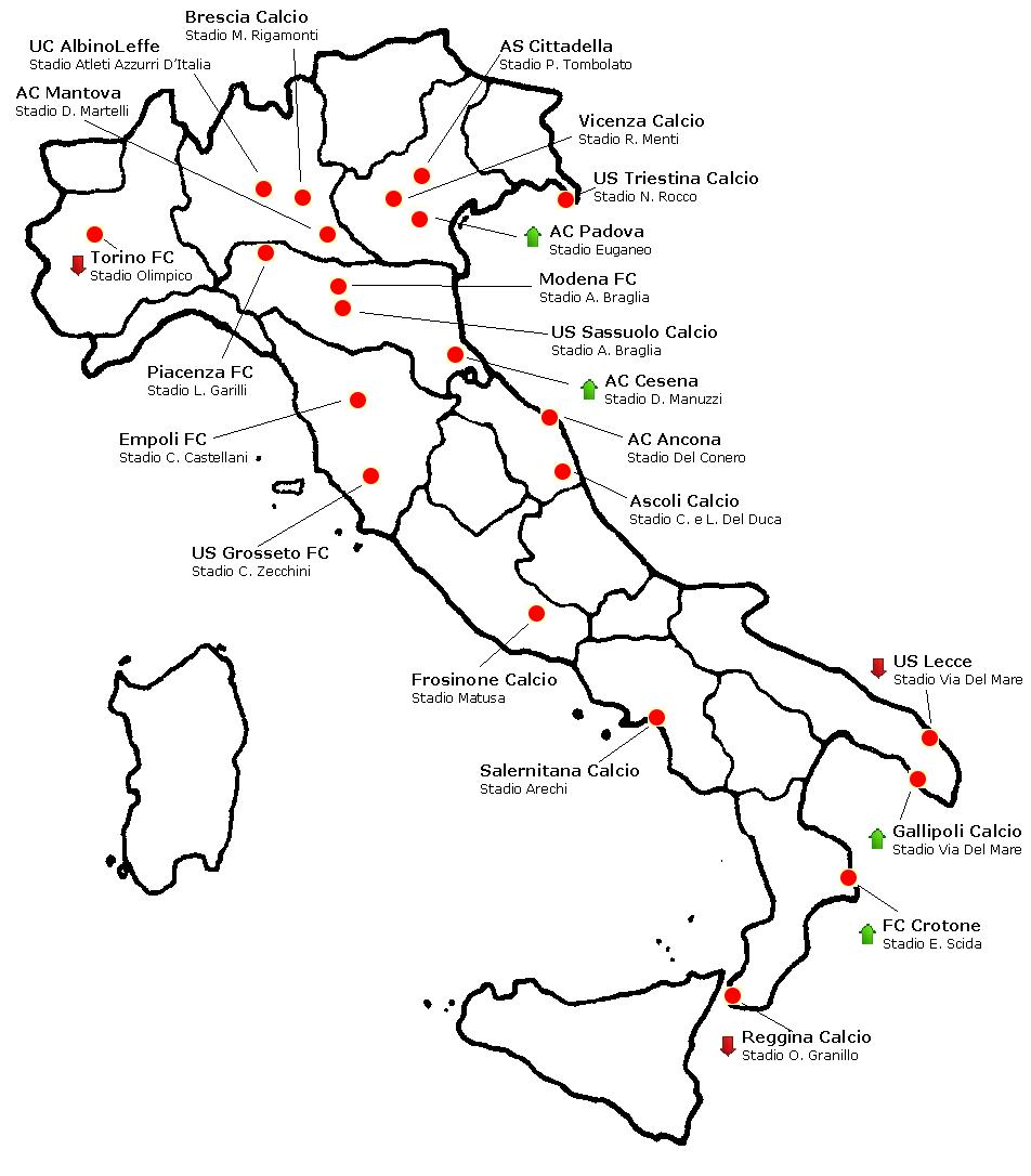 Distribuzione geografica squadre Serie B 2009-2010